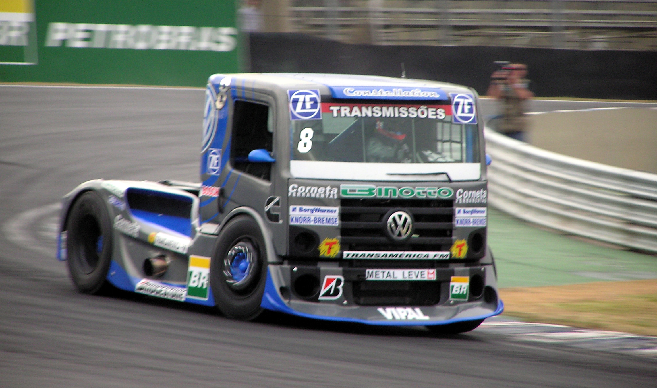 Fórmula Truck 2006 Rd.3 Interlagos: #8 Adalberto Jardim